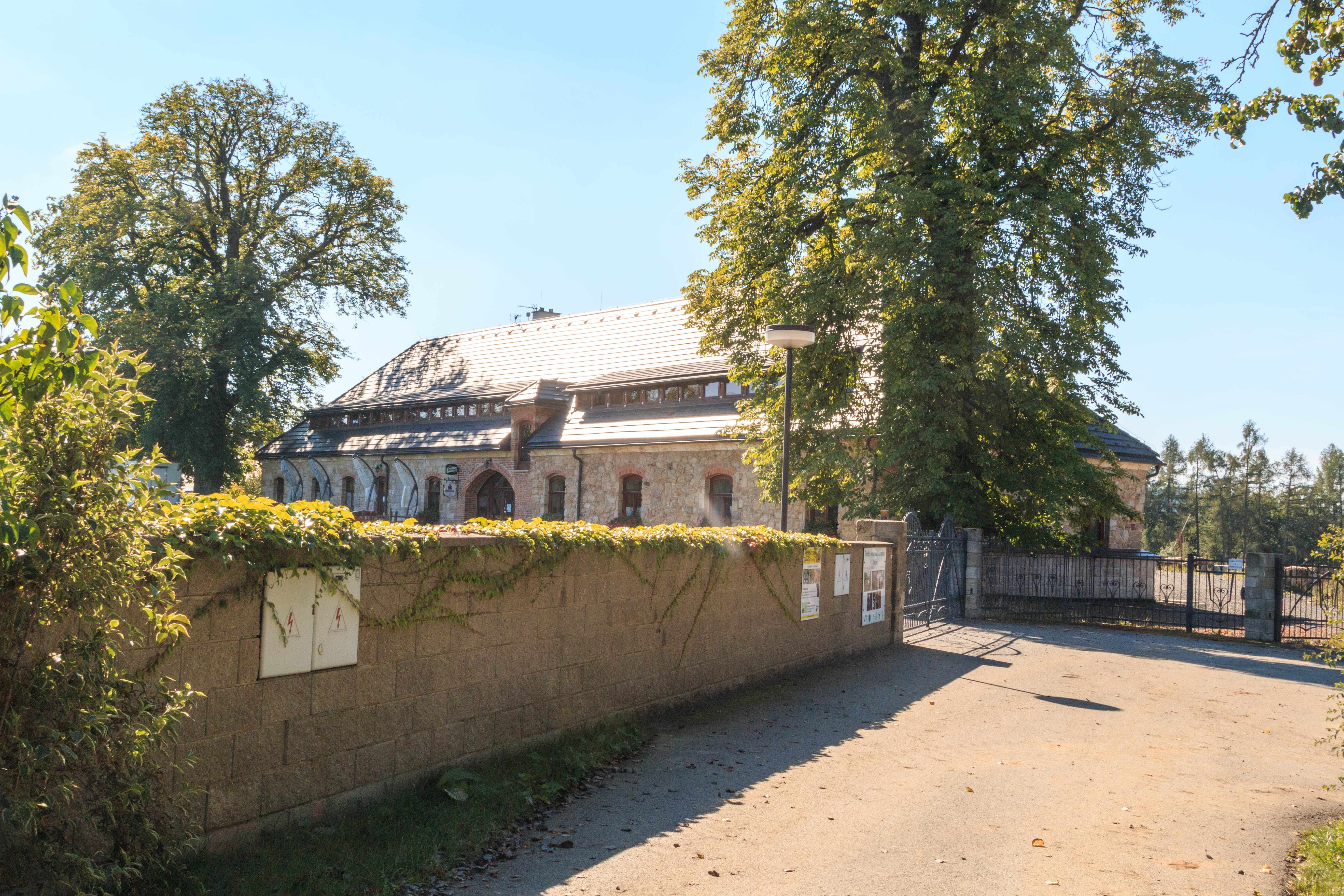 rekreační středisko Semínský Dvůr